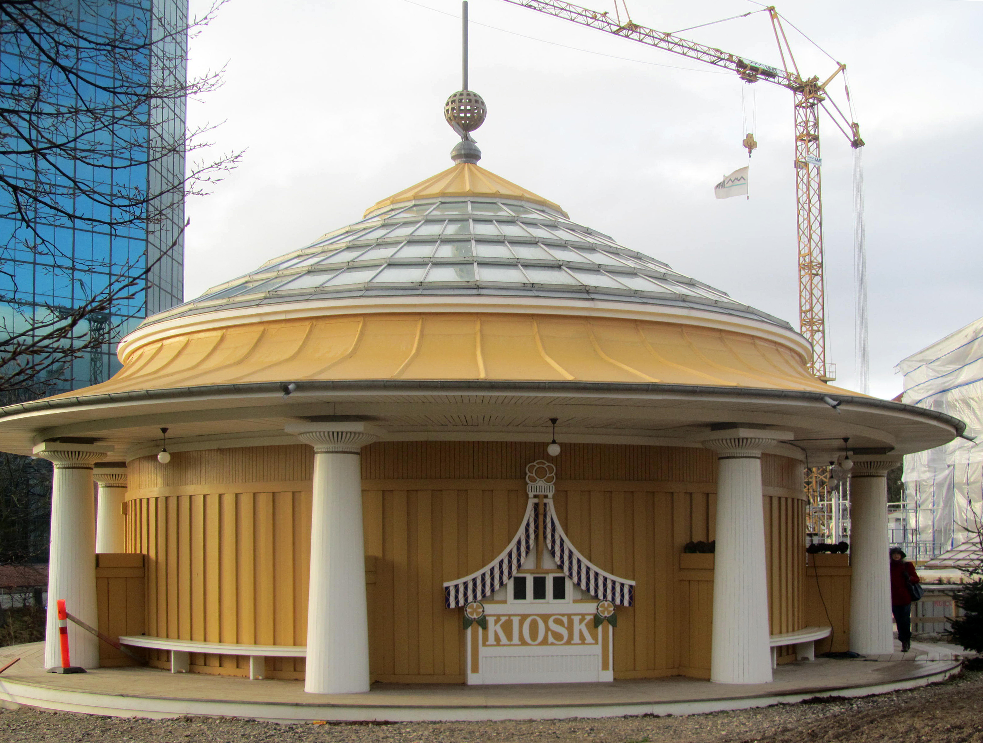 Politikens pavillon fra Landsudtillingen i Aarhus 1909, nu genopført i Den Gamle By i Aarhus